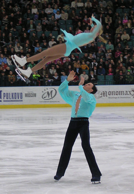 Tatiana Totmianina und Maxim Marinin während der Russischen Meisterschaften 2005